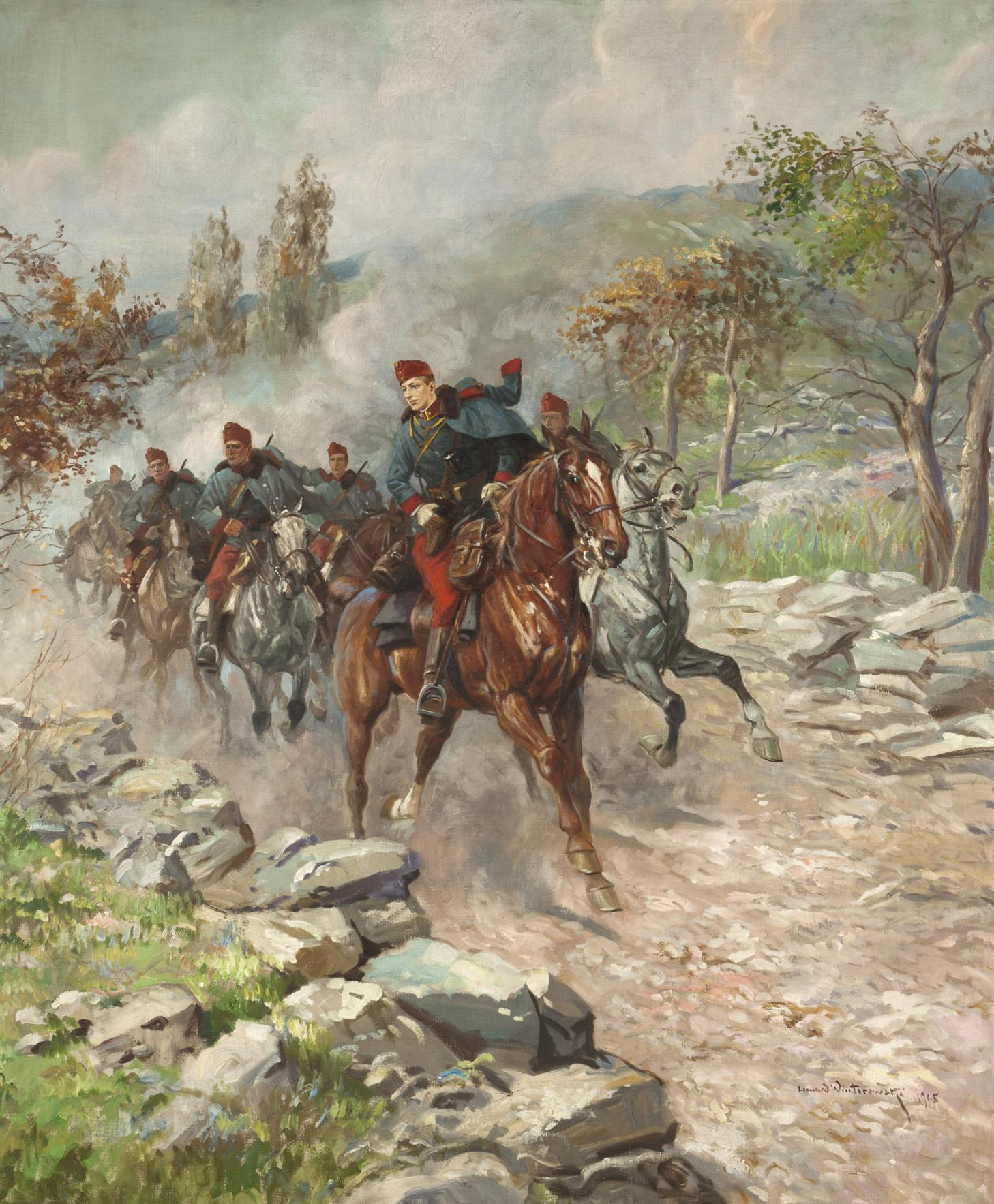 Österreichisch-ungarische Dragoner, rechts unten signiert und datiert: Leonard Wintorowski 1915, Öl/Leinwand, 150 x 125 cm